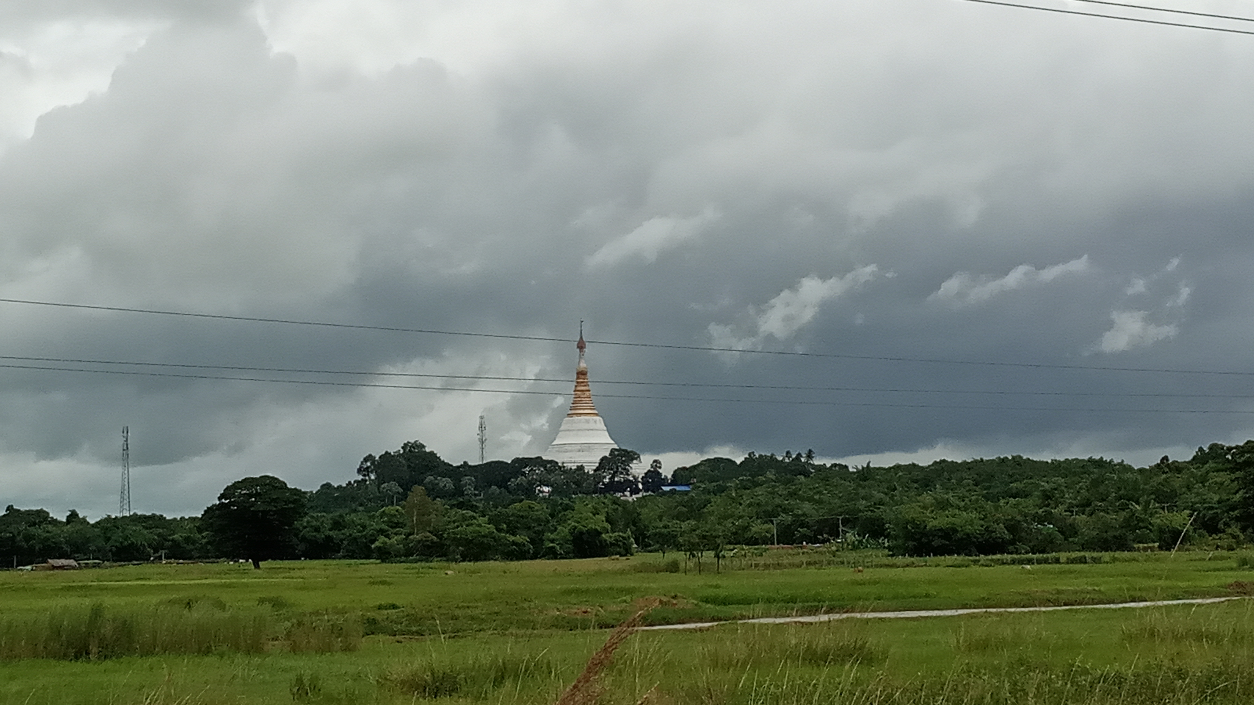 မြန်မာဘာသာ: ကျိုက်မတ်ကော်စေတီတော်၊ ဖလေးရွာ၊ ကဝမြို့နယ်